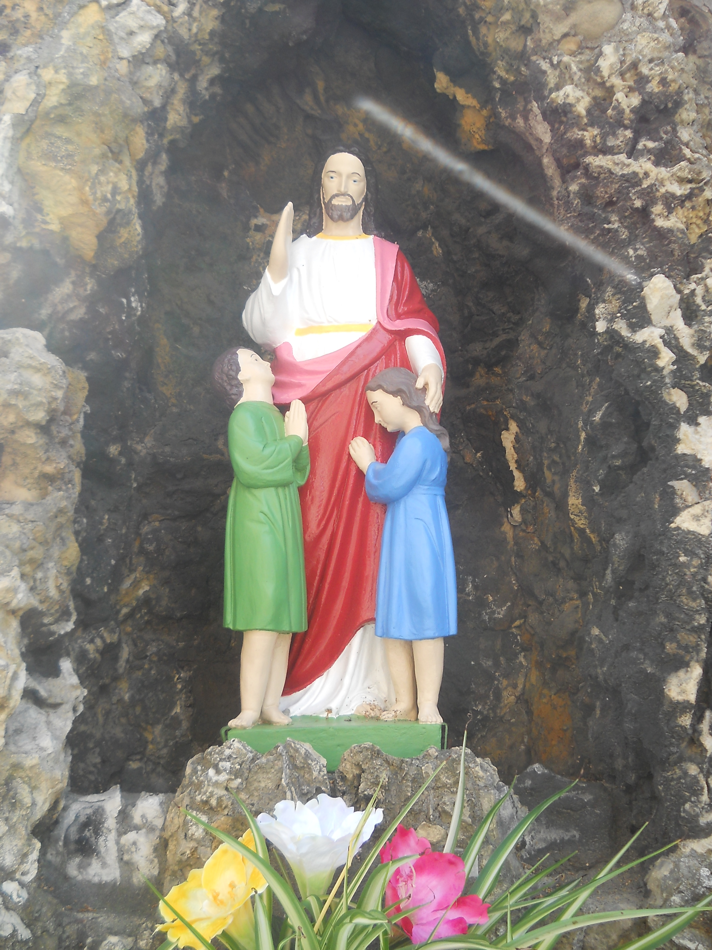 kościół par. p.w. św. Mikołaja - grota przykościelna Pyskowice, ul. Poniatowskiego